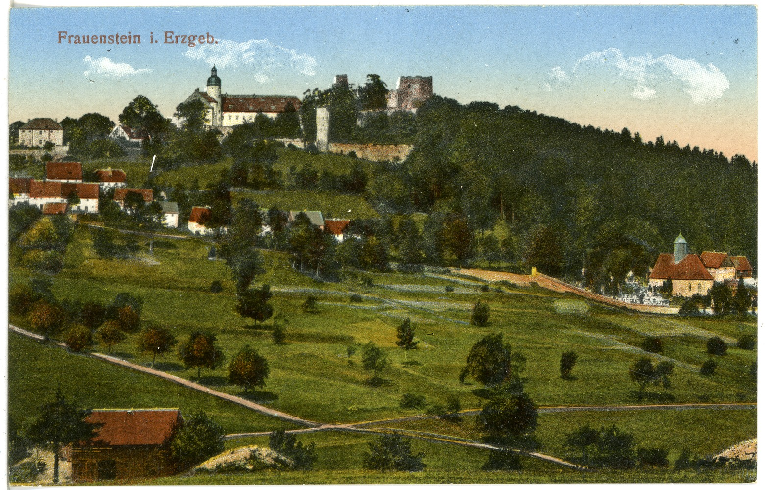 Frauenstein; Blick auf Frauenstein This postcard is from publisher Brück & Sohn in Meißen ( postcard has a unique number 21934 and is available in a higher resolution at the publisher. This images was uploaded in a cooperation project between Wikipedians and the publisher.